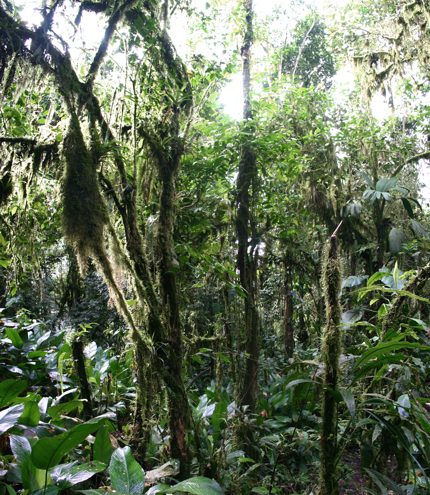 Cloud Forest Santa Lucia, Nanegal, Ecuador